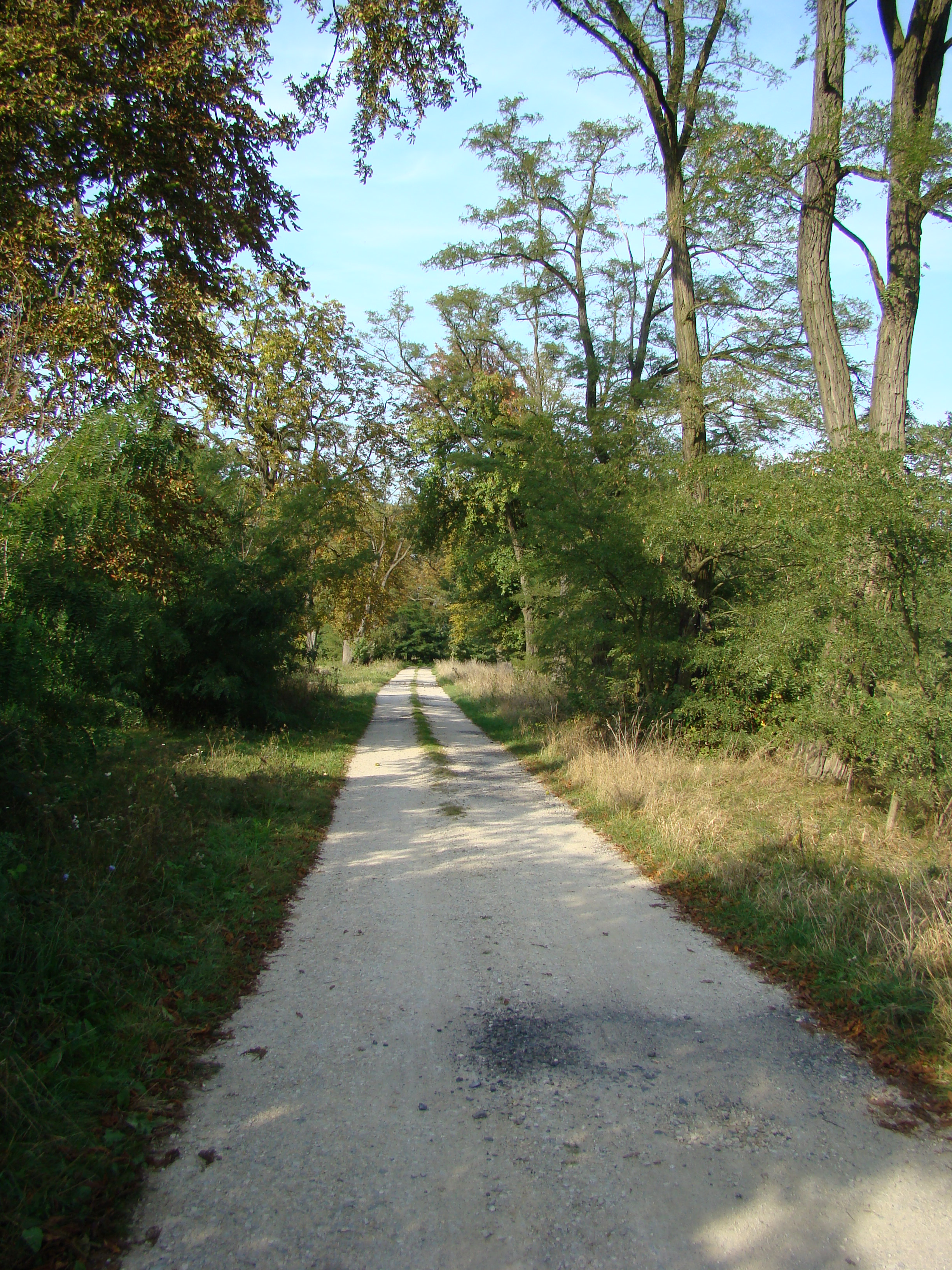 Park w Dobrenicach Wikidata has entry Q30092460 with data related to this item.